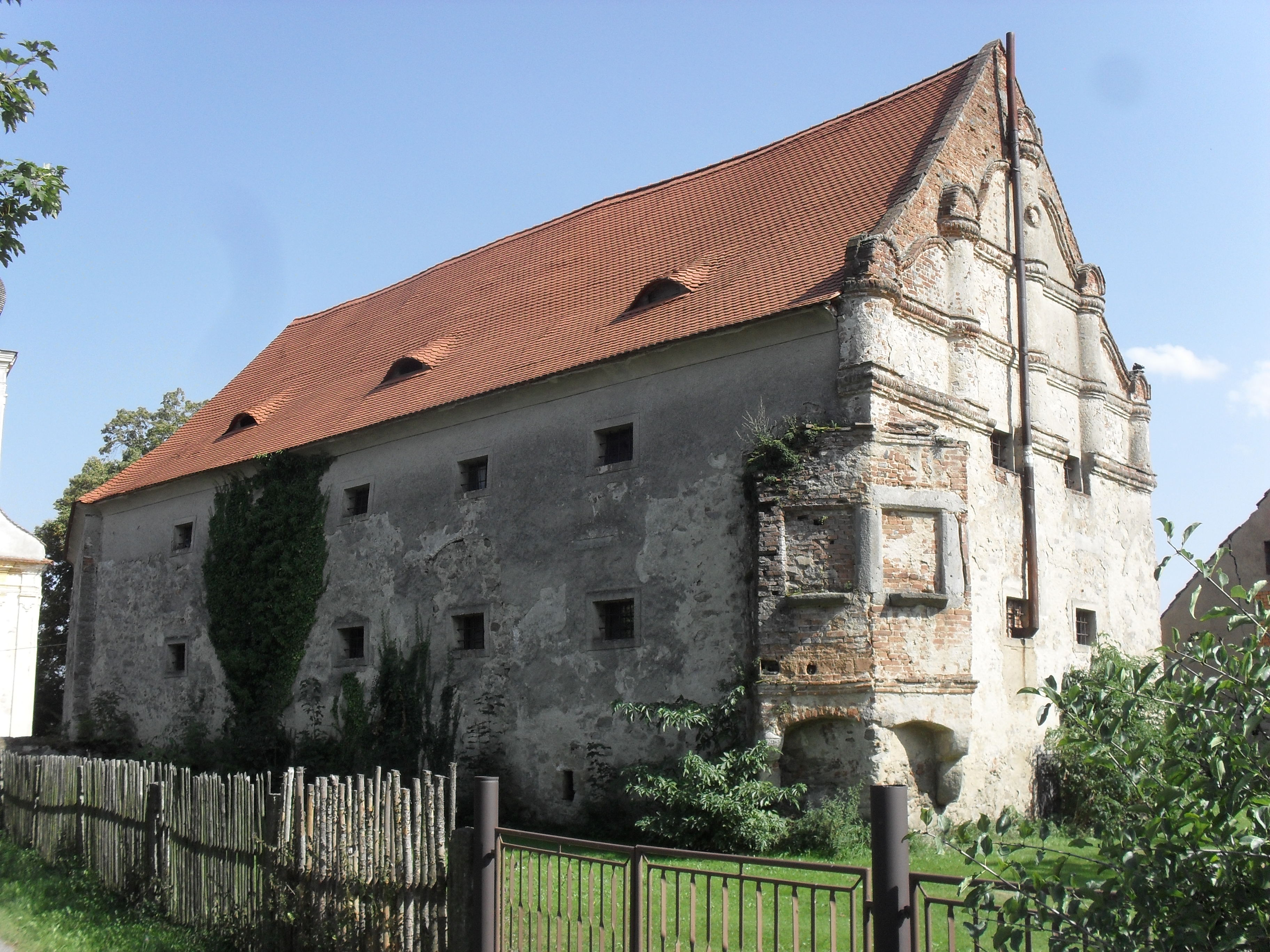 Fotografie pořízena v obci Kadov u Strakonic.